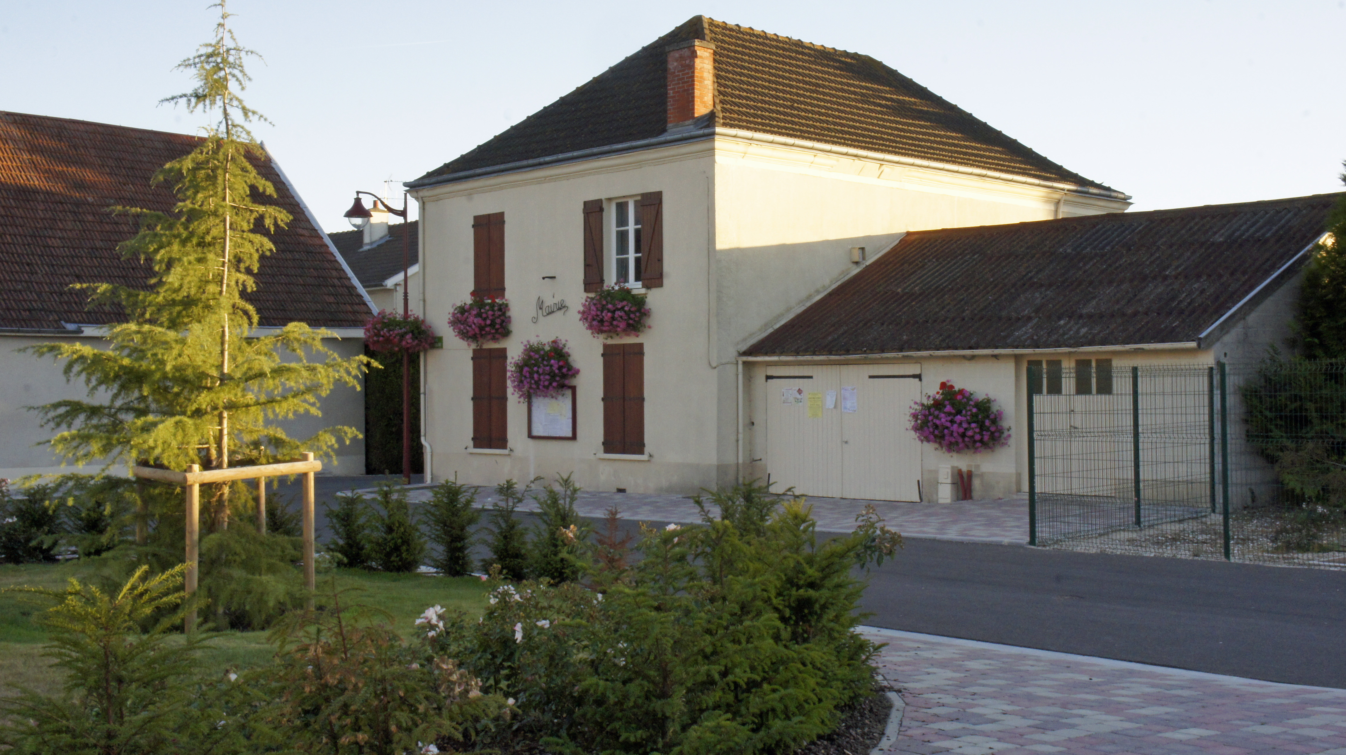 Mairie Grandes Loges